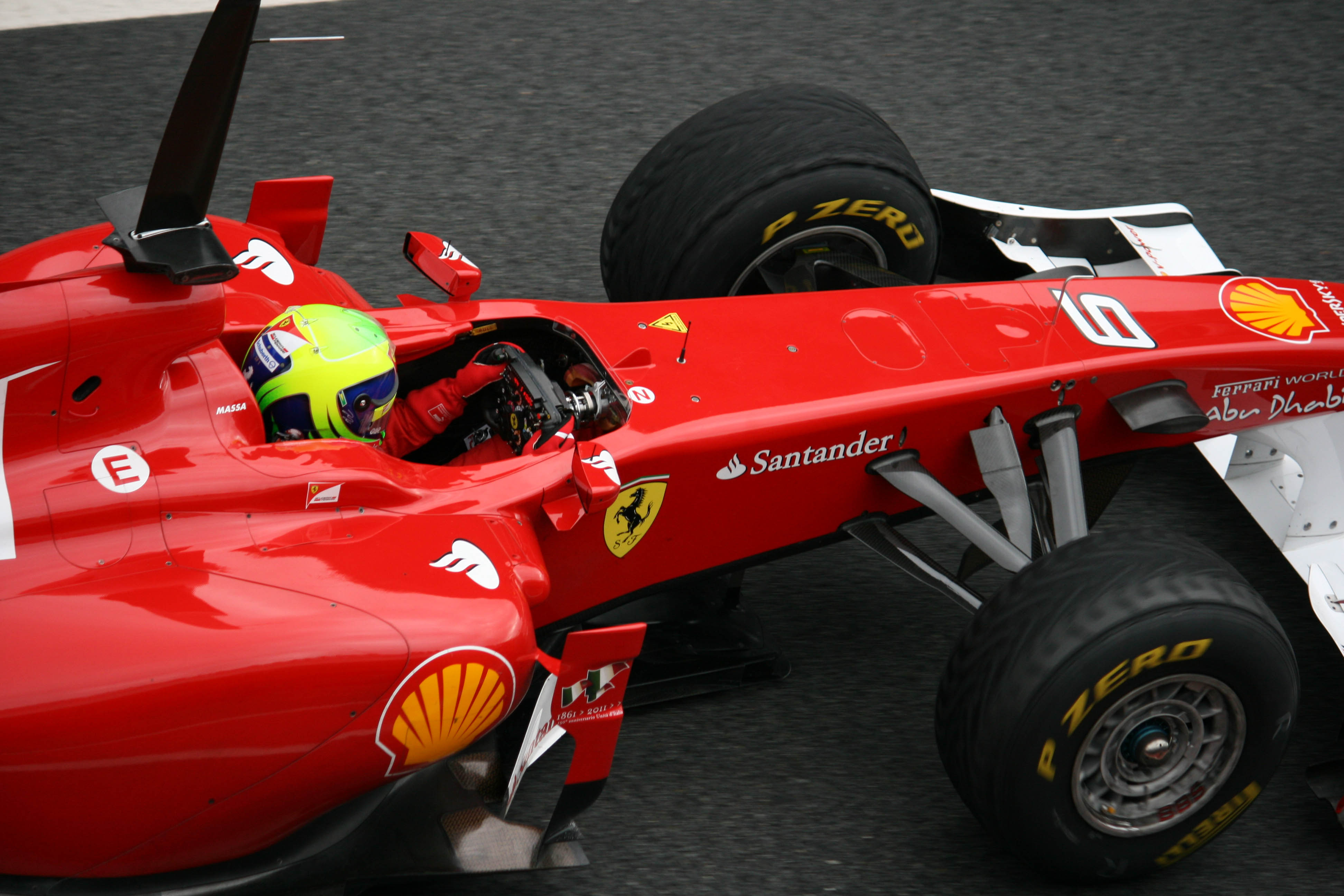 Massa